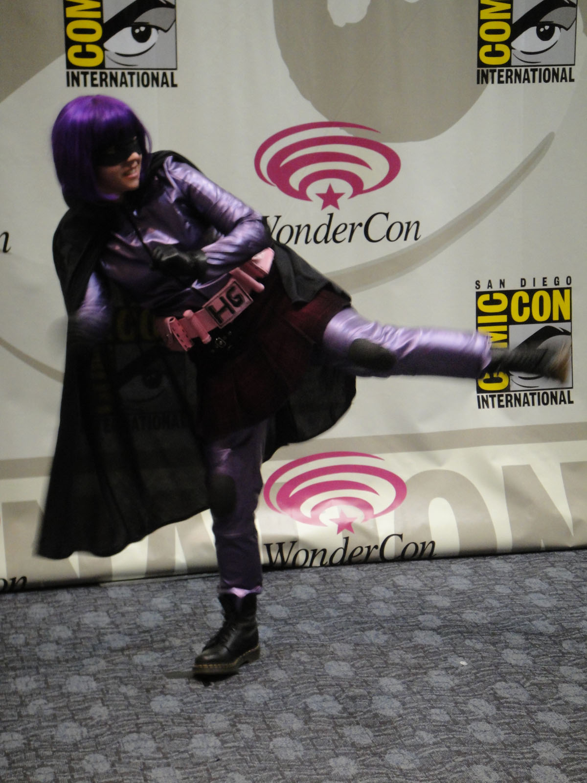 WonderCon 2011 Masquerade - Hit Girl